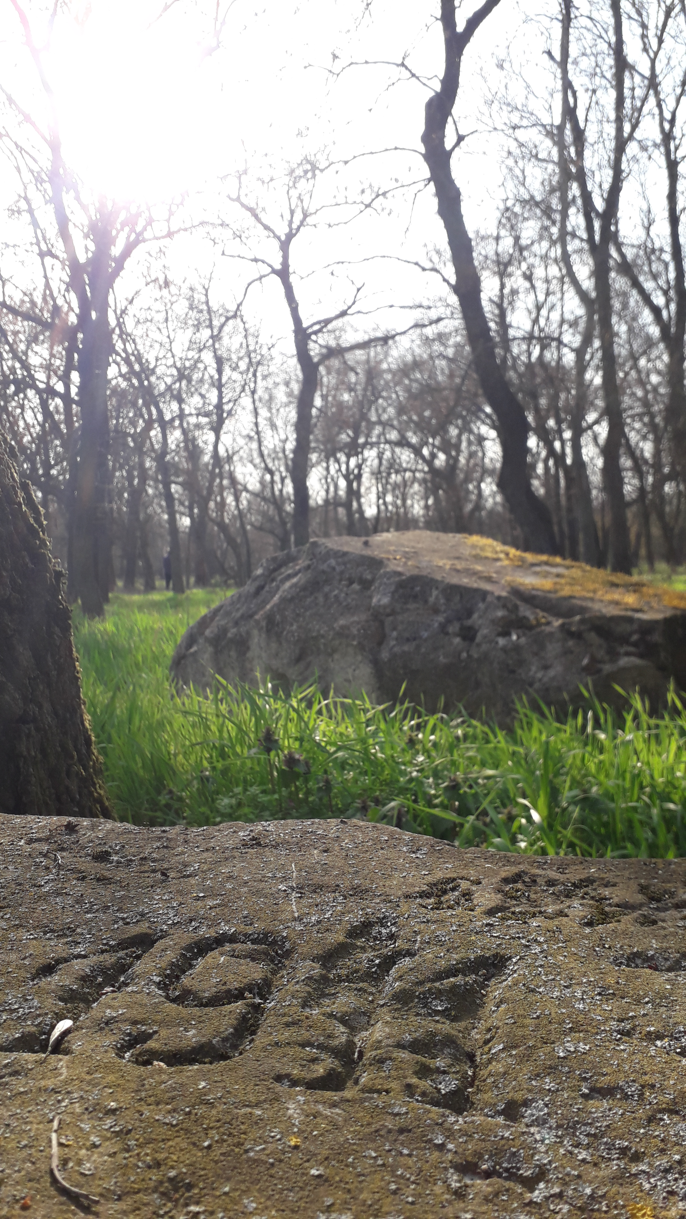 Kápolnarom